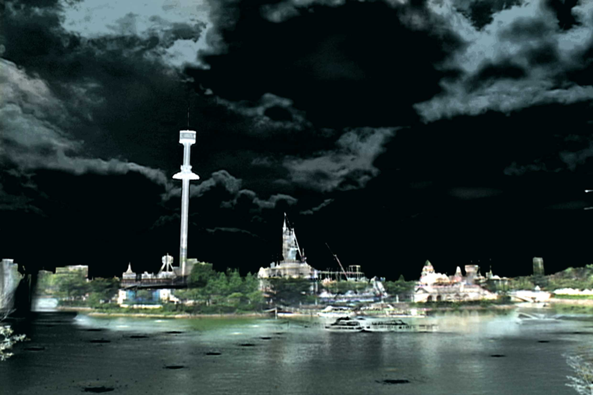 최재훈 the world 2분26초 단채널영상 2003